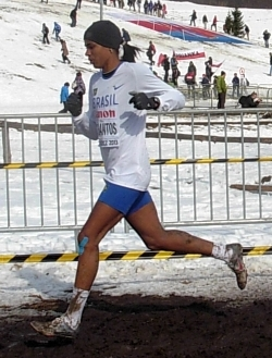 Mistrzostwa Świata w Biegach Przełajowych IAFF 2013 w Leśnym Parku Kultury i Wypoczynku Myślęcinek w Bydgoszczy: Juliana Paula dos Santos